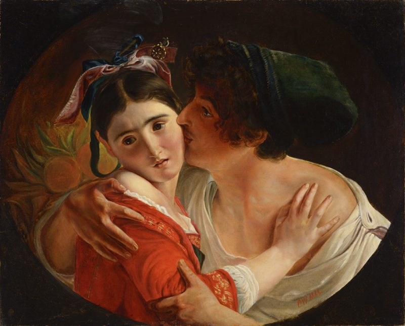 Vasakul tumedajuukselise tütarlapse poolfiguur punases pluusis, enface, paremal mees profiilis vasakule, teda kergelt tõrjuvat tütarlast põsele suudlemas.